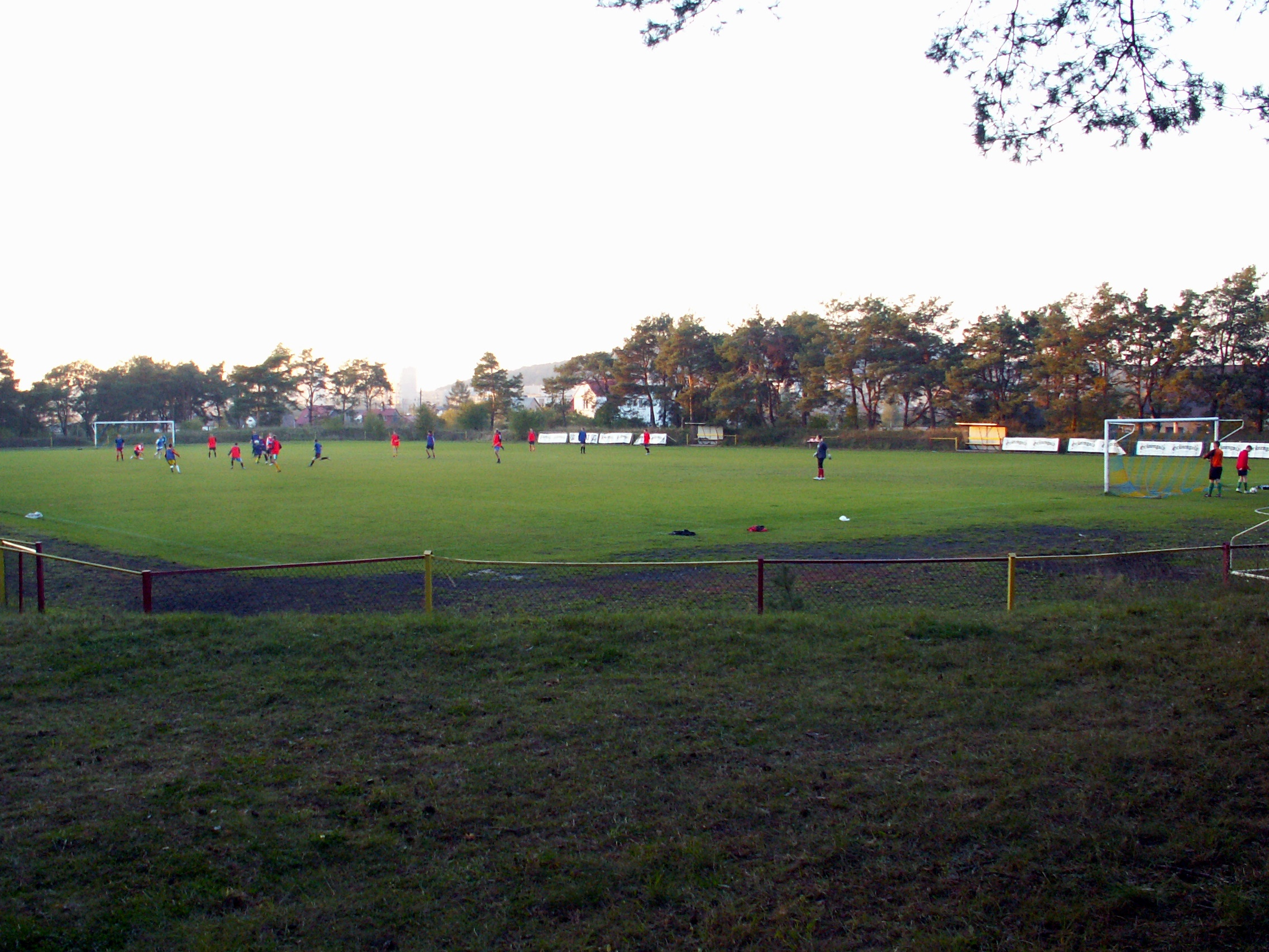 Stadion Leśny w Kielcach